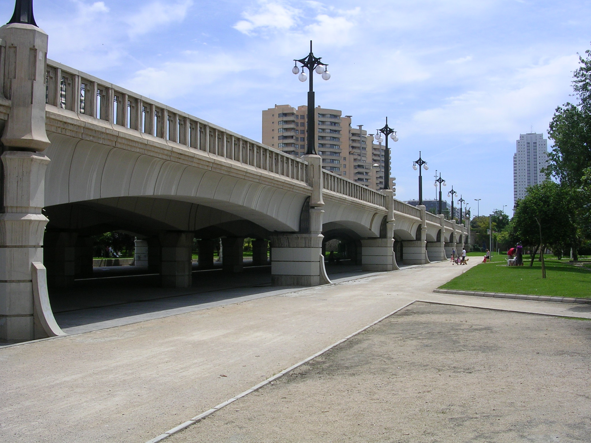 Puente del Reino en Valencia, Spain